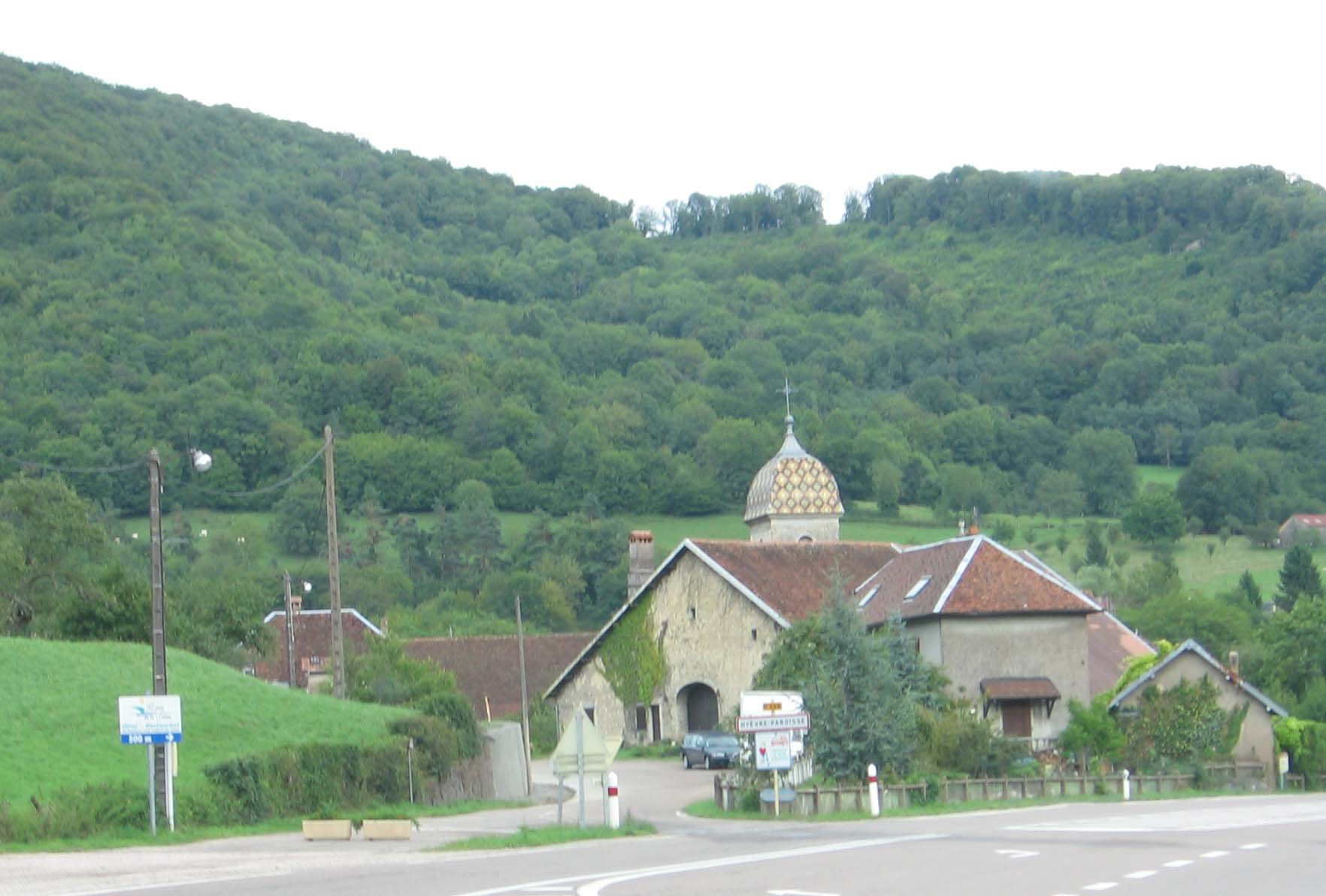 Hyèvre-Paroisse, France